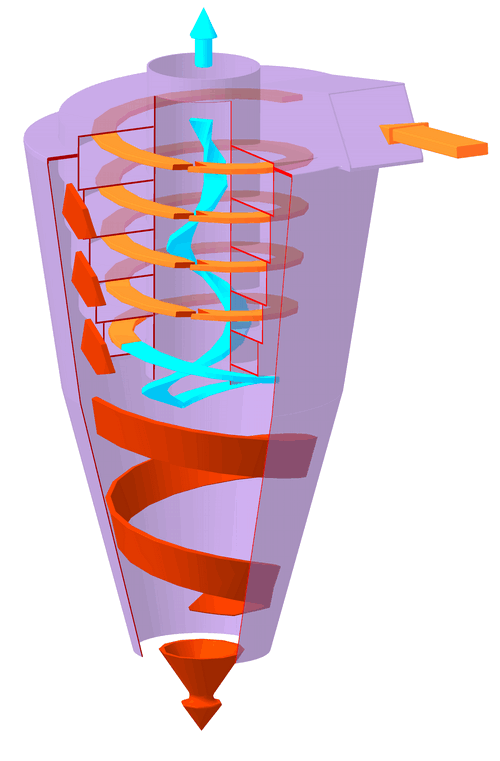 Центробежная камера очистки в разрезе